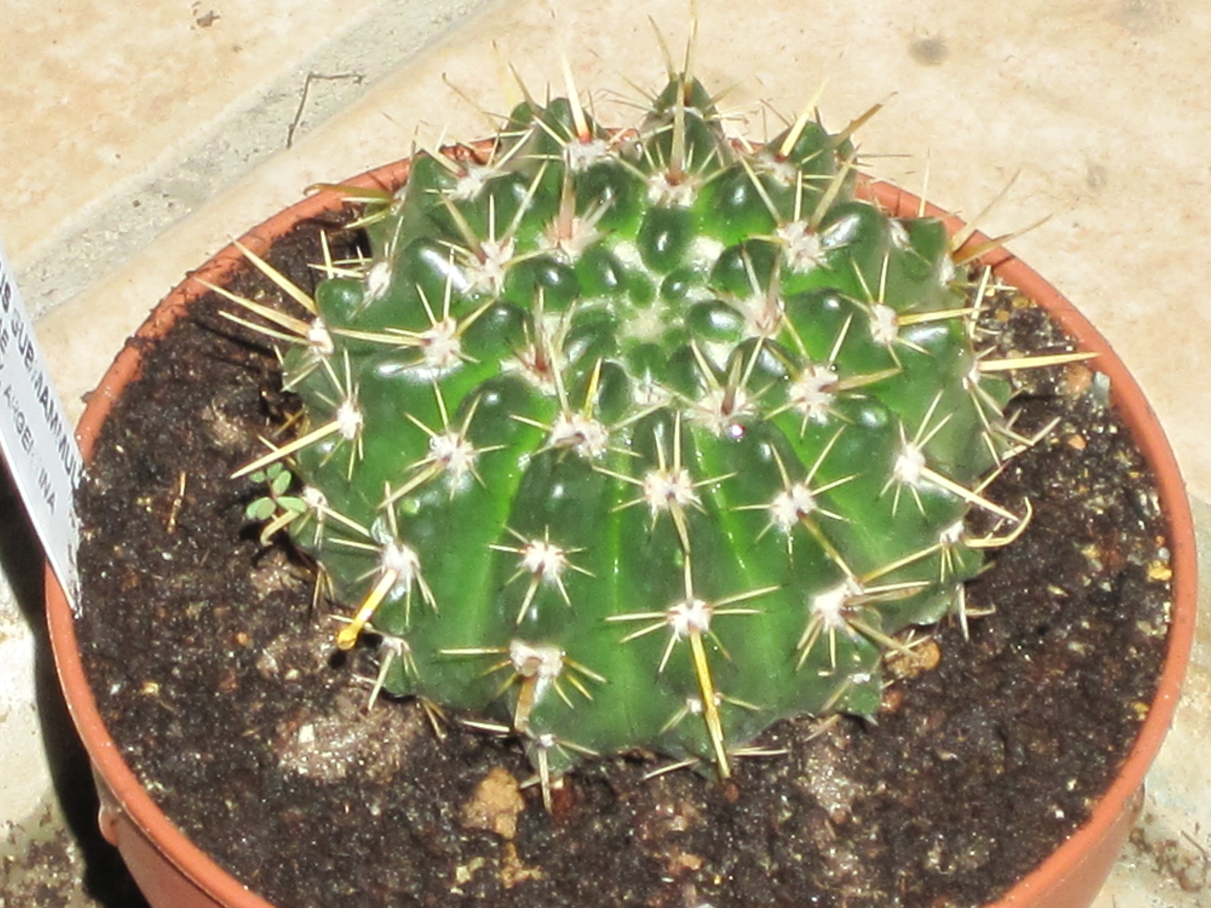 Parodia mammullosa